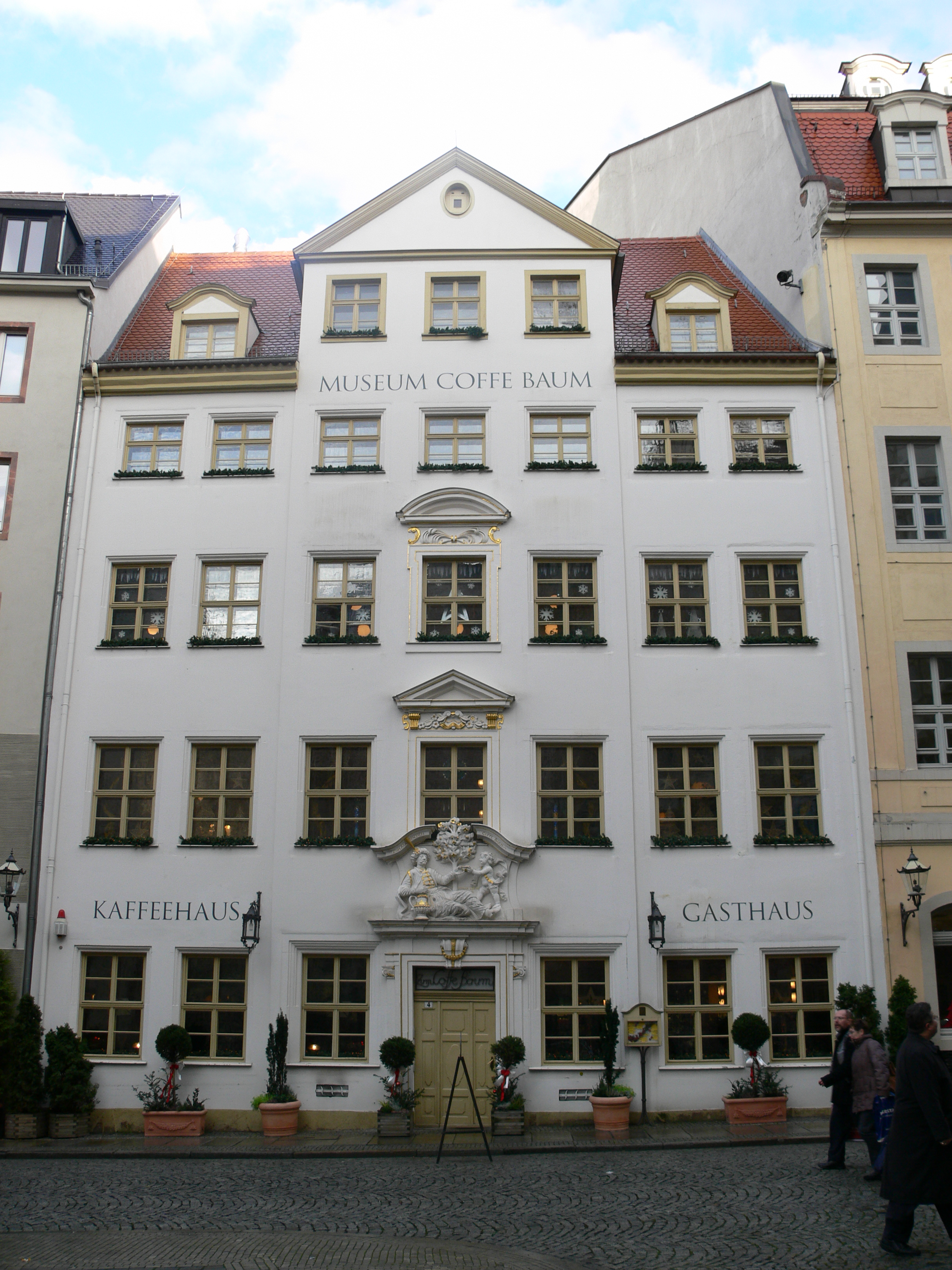 Café und Museum "Zum arabischen Coffe Baum", Leipzig